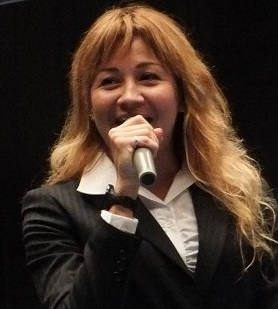 クリステル・チアリ。2014-09-15(月曜日・敬老の日）、全日本プロレス後楽園ホール大会にて。